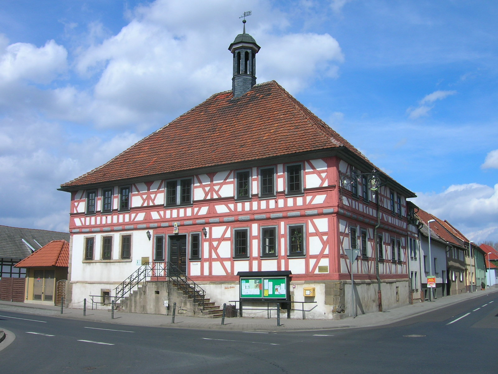 Wandersleben in Thüringen, Gemeindeverwaltung